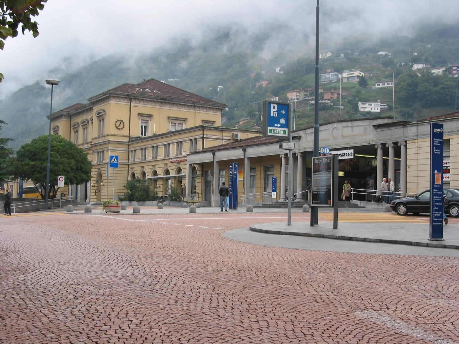 de: Bahnhof von Bellinzona en: train station of Bellinzona it: stazione di Bellinzona